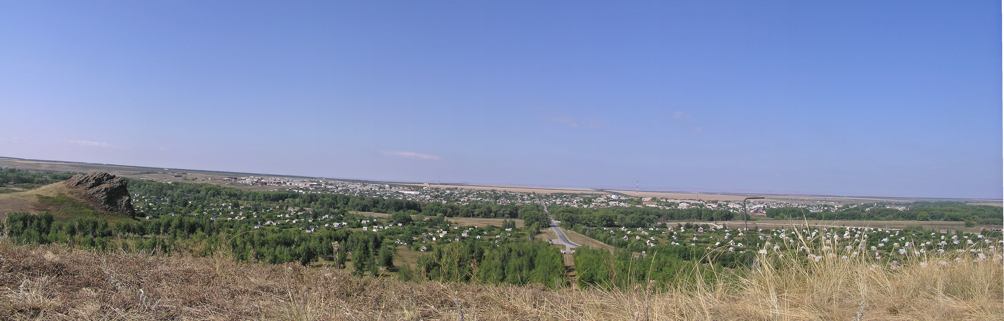 Кизильское